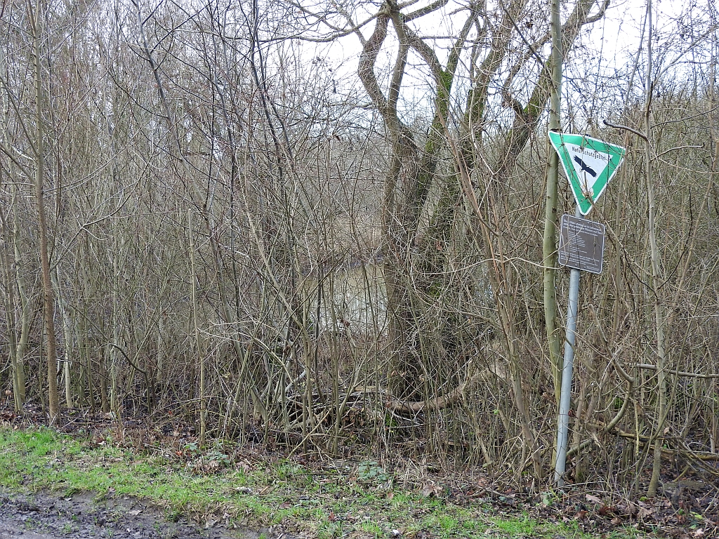 Altrhein-Königsee bei Dettenheim, 08.01.2016